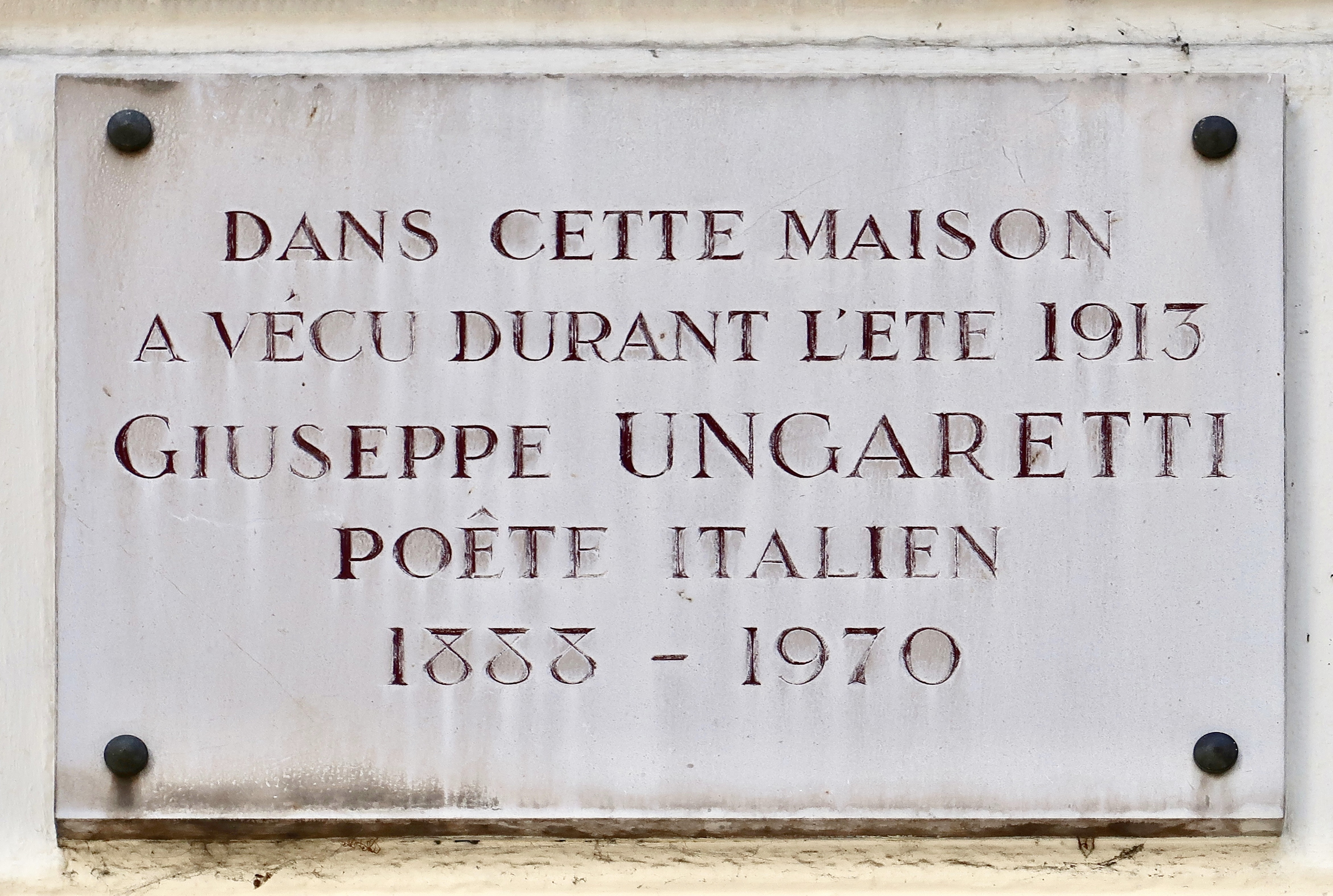 Plaque en hommage à Giuseppe Ungaretti, 5 rue des Carmes (Paris, 5e).